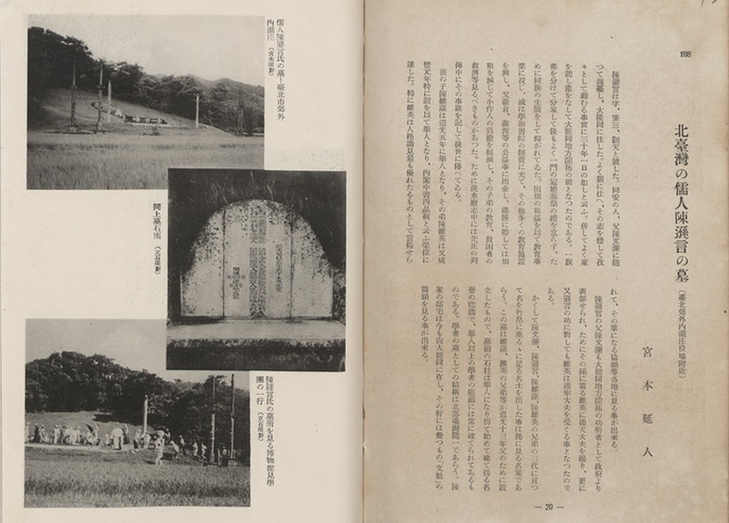 北臺灣の儒人陳遜言の墓中文（台灣）: 陳遜言之墓